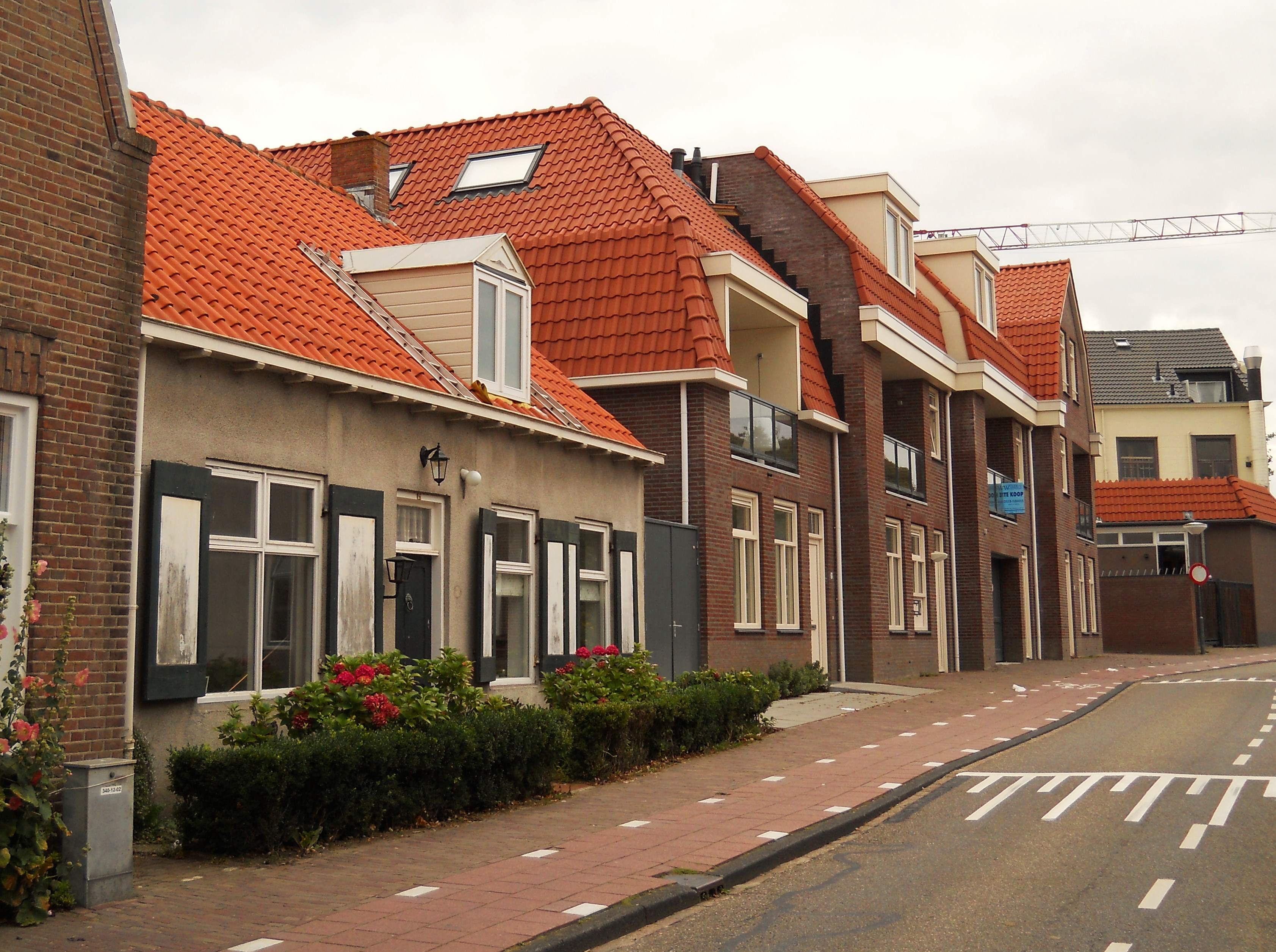 Zicht op een deel van het centrum van Domburg, met oude en nieuwe panden.